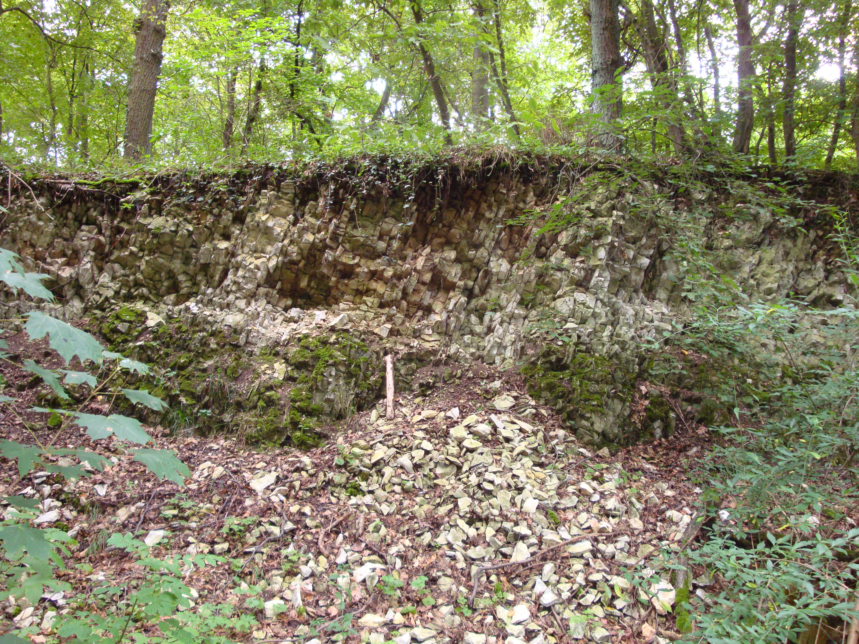 Geologischer Aufschluss der Hangendsschichten in der Nähe Grube Fortuna (Groß Döhren), Naturdenkmal ND-GS 24 im Landkreis Goslar